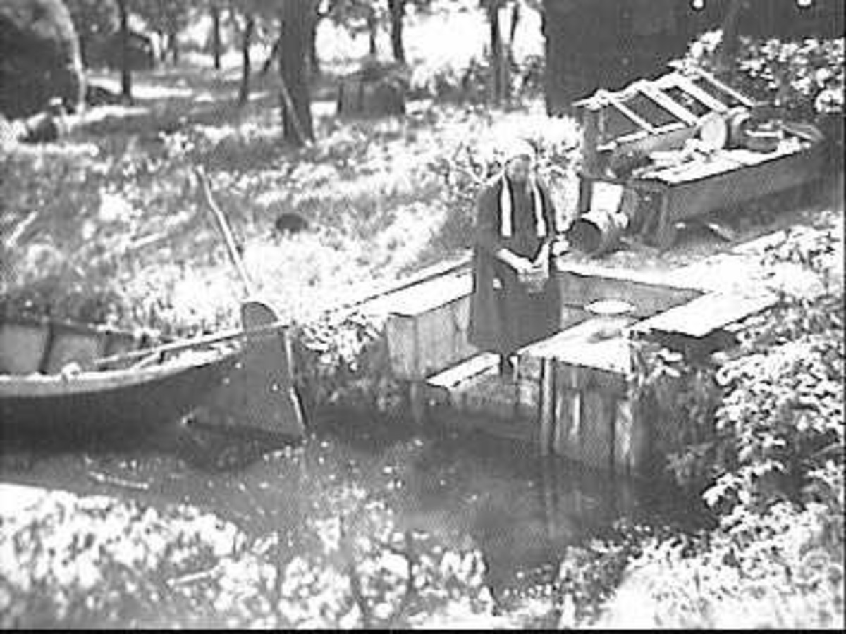 Weidegebied/ Spoelplaats: boenstoepje van hout (opmerking: Deze afbeelding hebben wij helaas alleen in deze lage resolutie.)